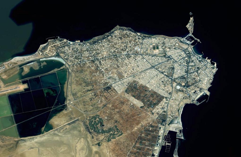 Monastir vazut din spatiu. Imagine realizata cu date SRTM furnizate liber de NASA si textura World IMagery.